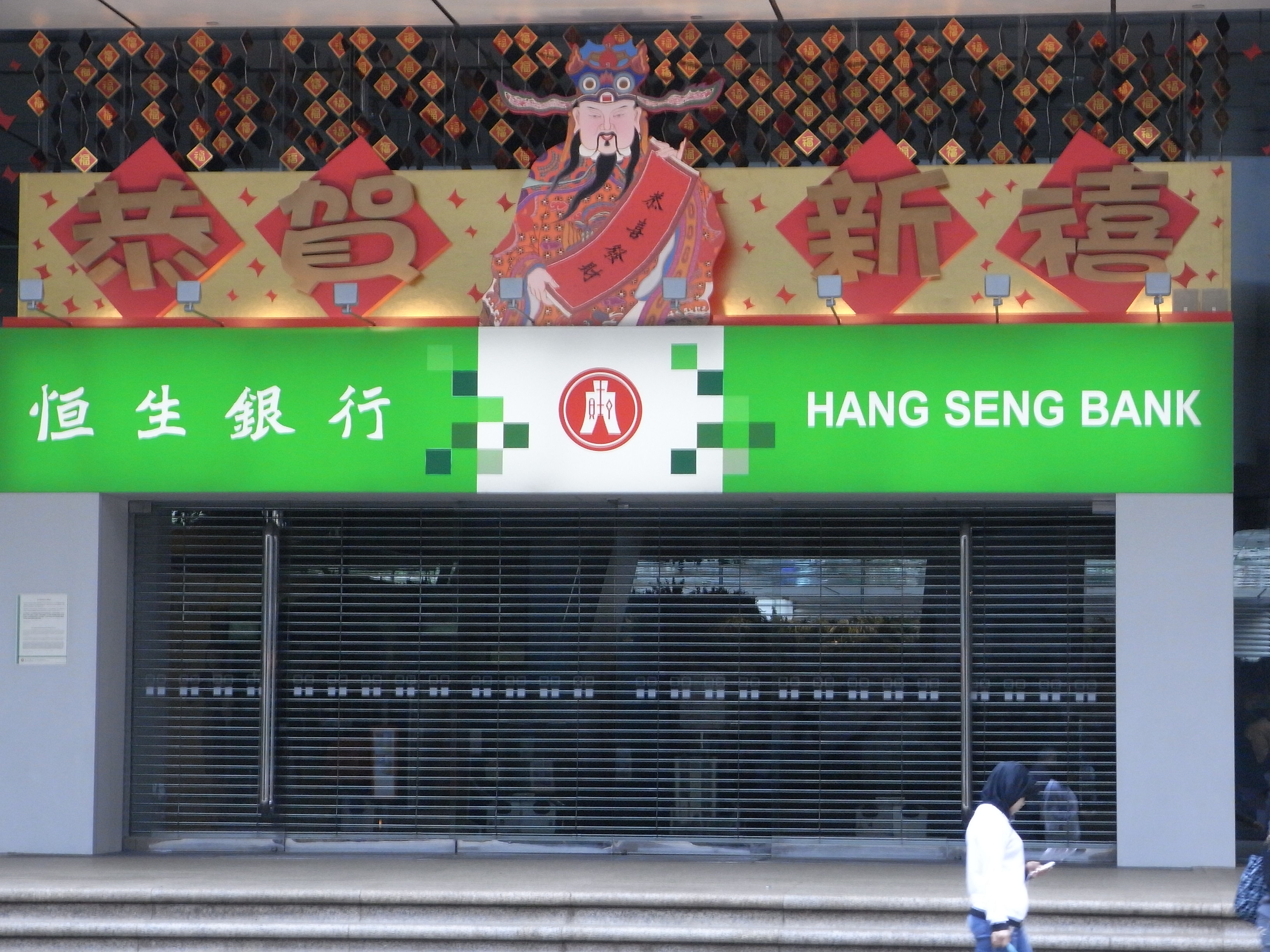 中文（香港）: 中環 恆生銀行總行大廈